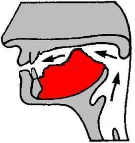 Palataal fonetiek